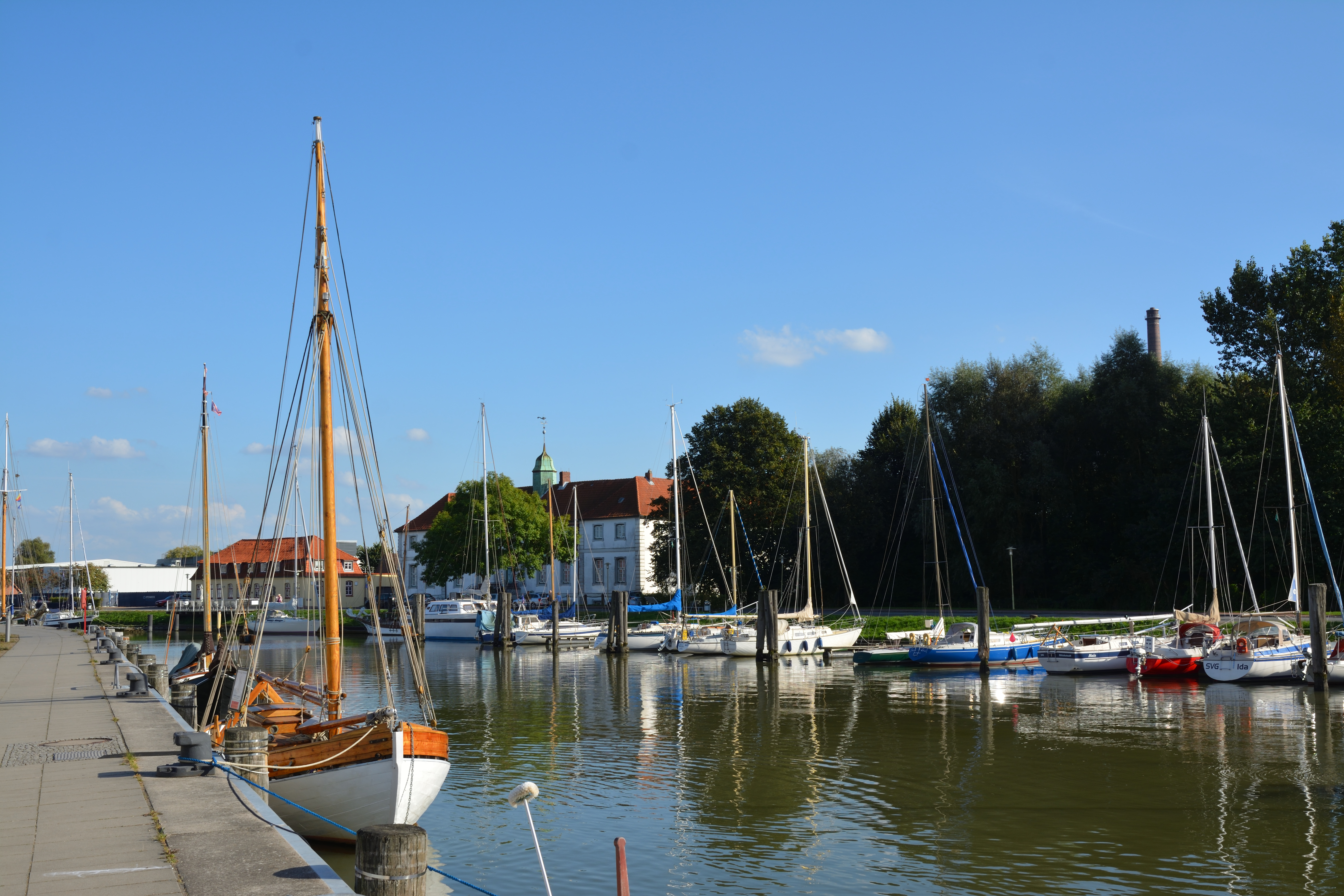 Impressionen vom Binnenhafen Glückstadt September 2016